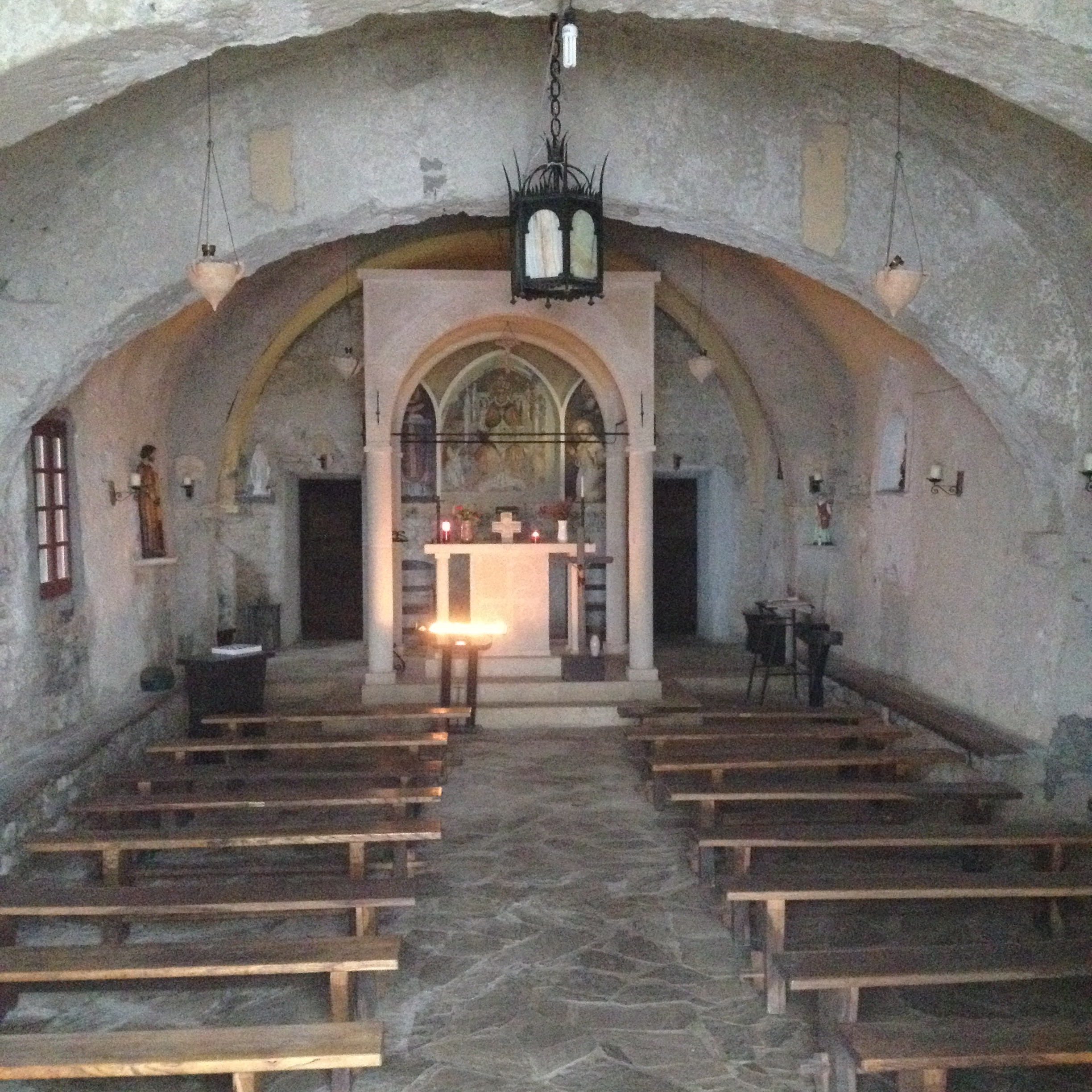 Abbazia san Pietro in Varatella - interno - comune di Toirano (SV) - Italy